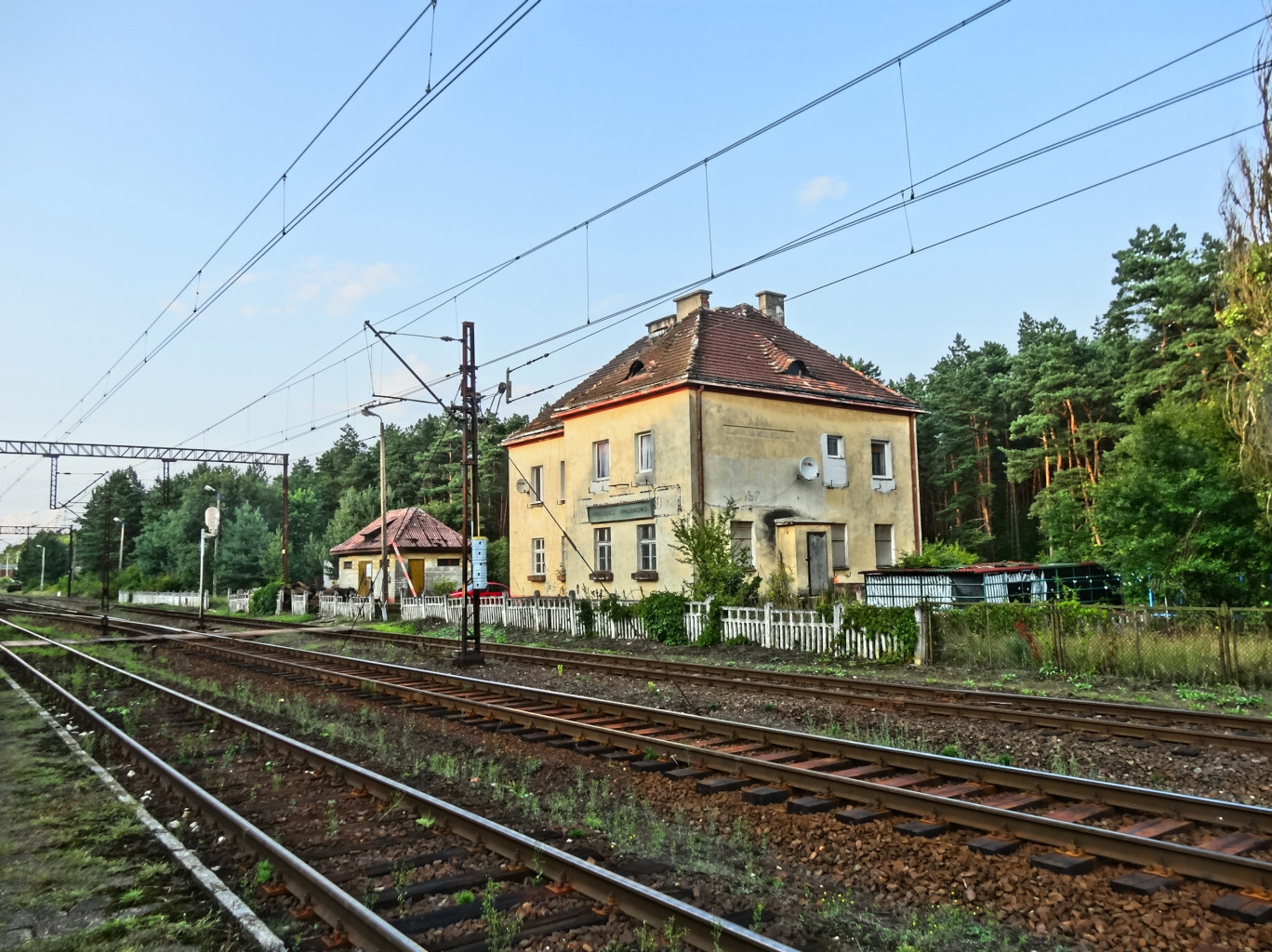 Stacja kolejowa Bydgoszcz Emilianowo w Puszczy Bydgoskiej